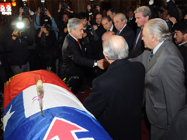 El Presidente de la República, Sebastián Piñera, asistió este mediodía al velatorio del ex senador y ex canciller Gabriel Valdés Subercaseaux, fallecido ayer.